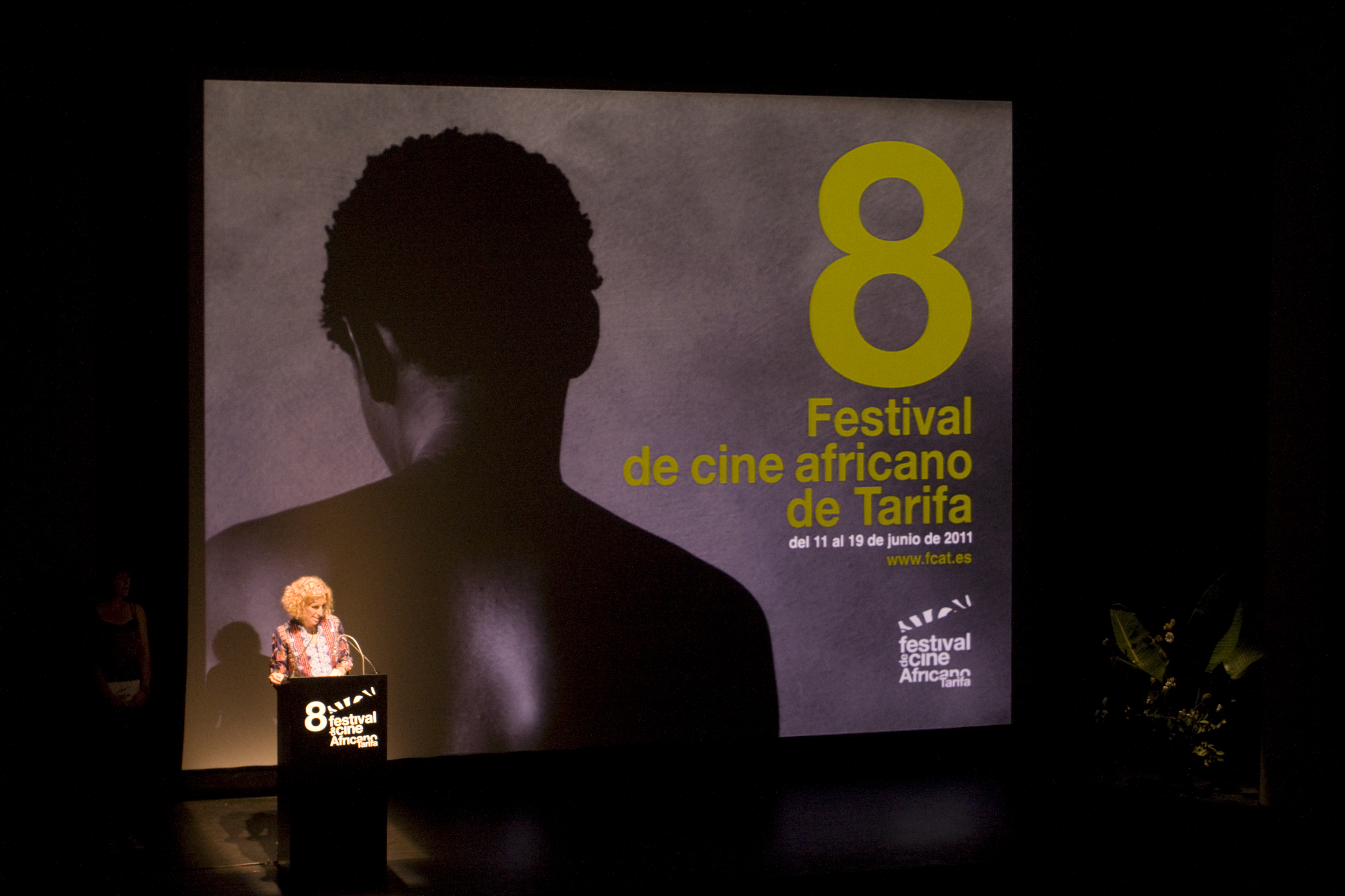 Mane Cisneros, directora del festival en un momento de la gala de inauguración